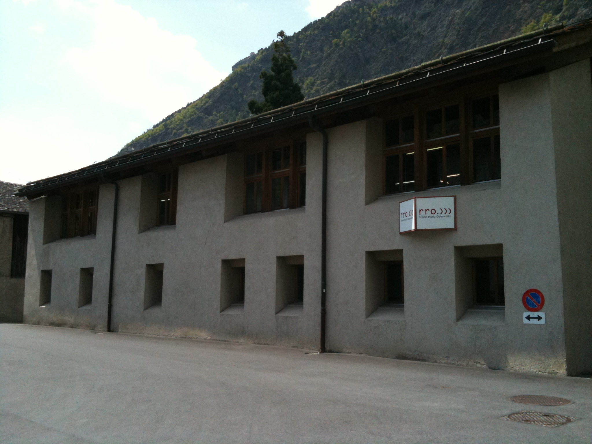 Studio des Senders Radio Rottu Oberwallis in Visp